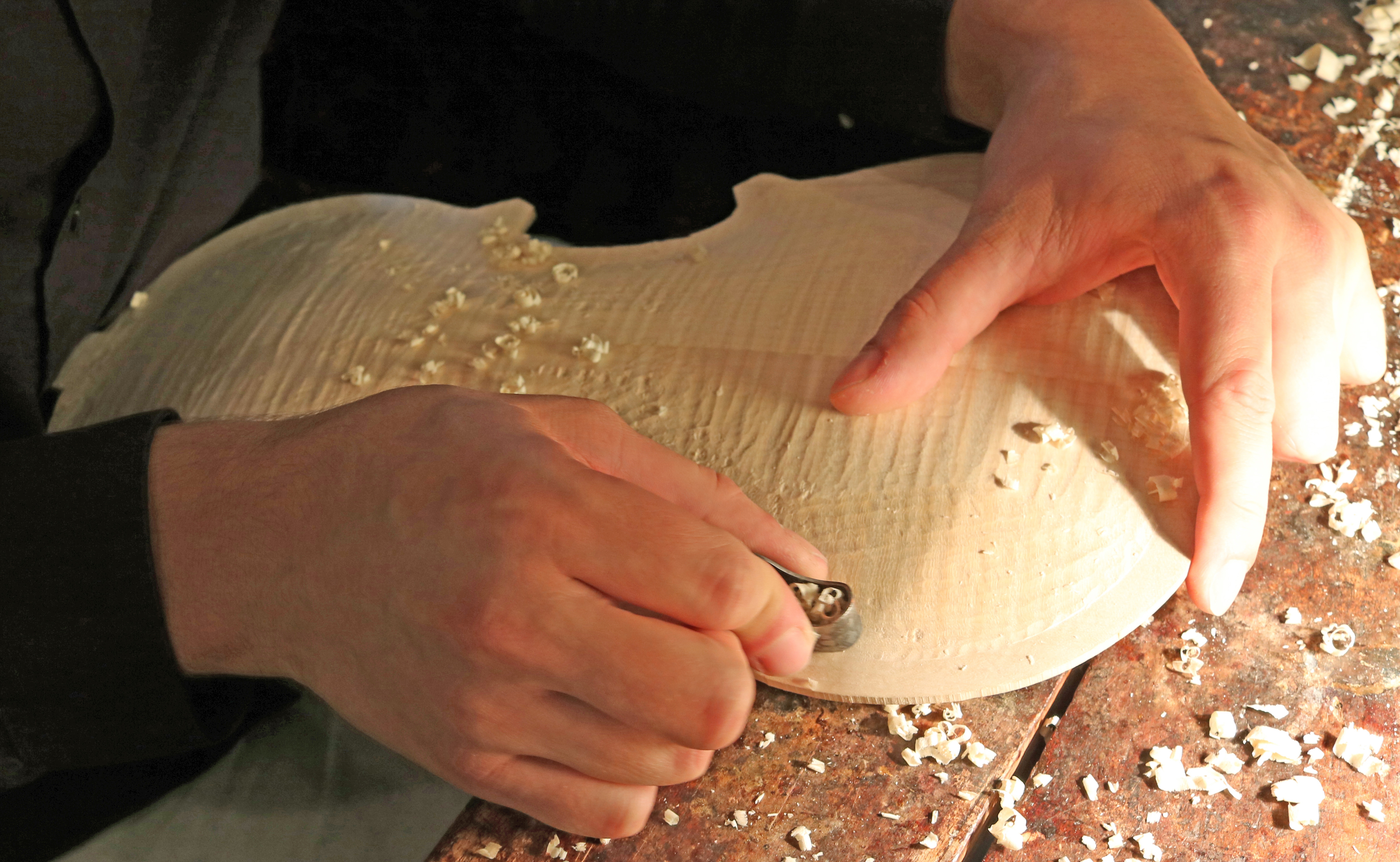 Herstellung einer Violine: Wölben des Violinbodens. Vorführung auf der Instrumenta 2016 in Nürnberg. Ausführender: Ferdinand Seidl, Marktneukirchen.